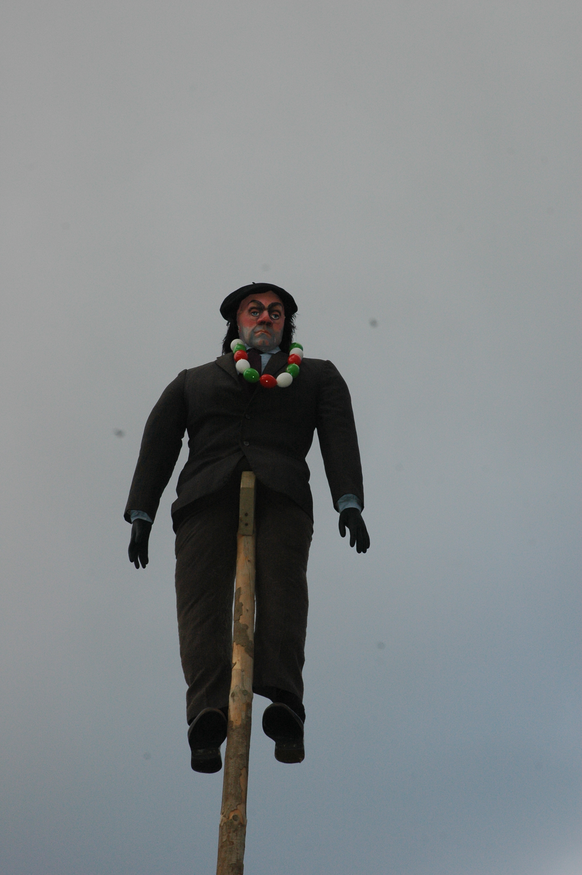 Markitos, 2009ko Zalduondoko inauterietan.